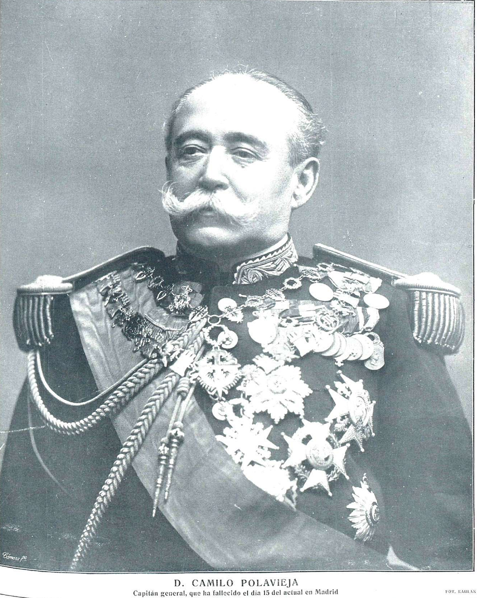 Retrato de Camilo Polavieja, obra del fotógrafo Kaulak, recogido en la revista española La Esfera.